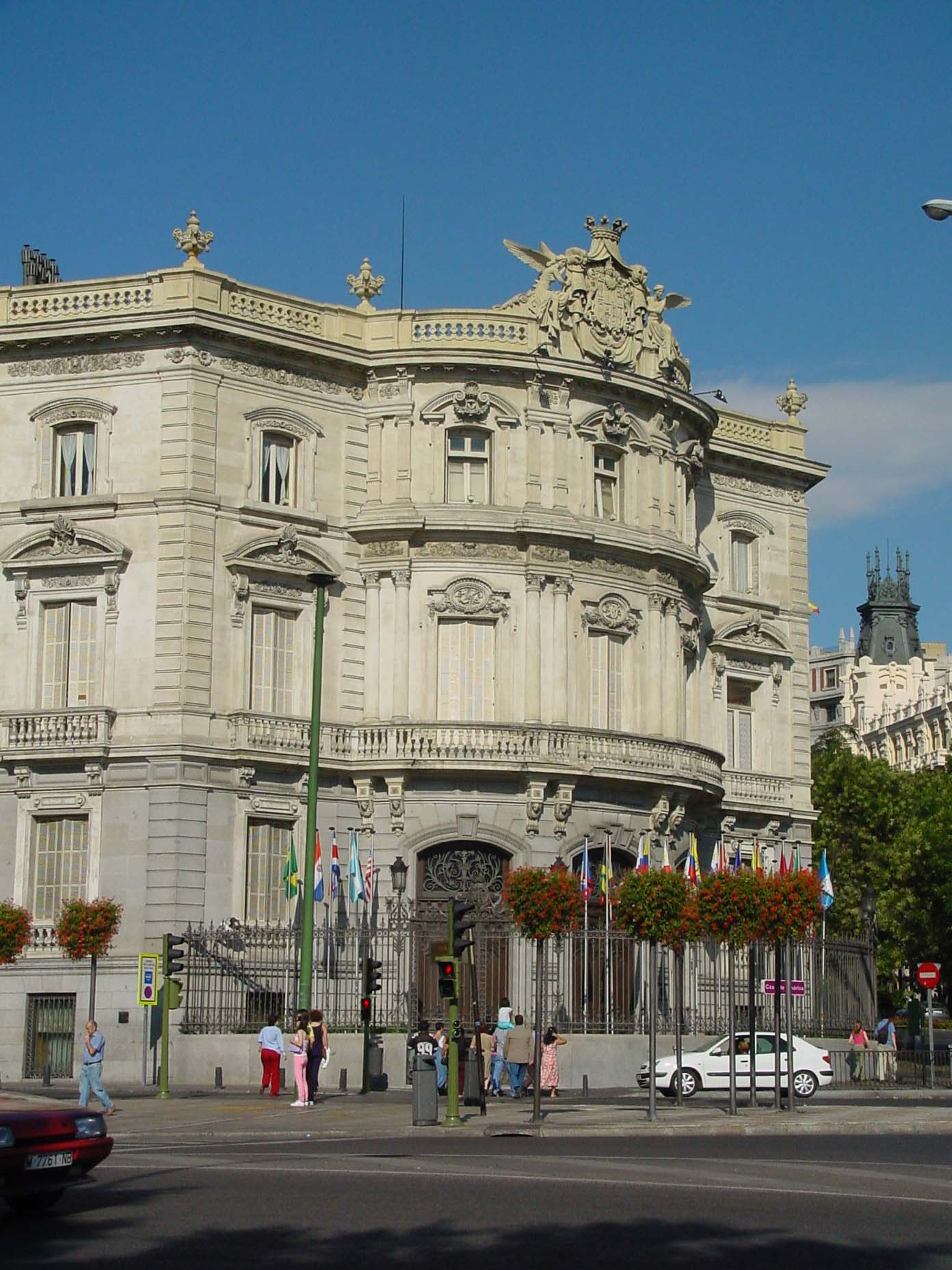 Casa de América o Palacio de Linares de Madrid